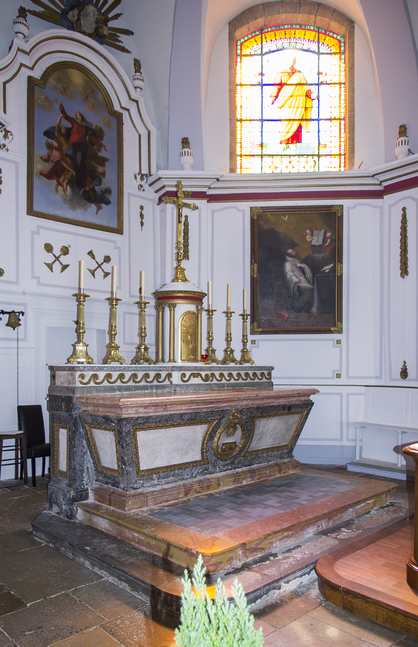 Maître Autel de l'eglise de Noidans, provenant de l'ancienne Abbaye de Bellevaux